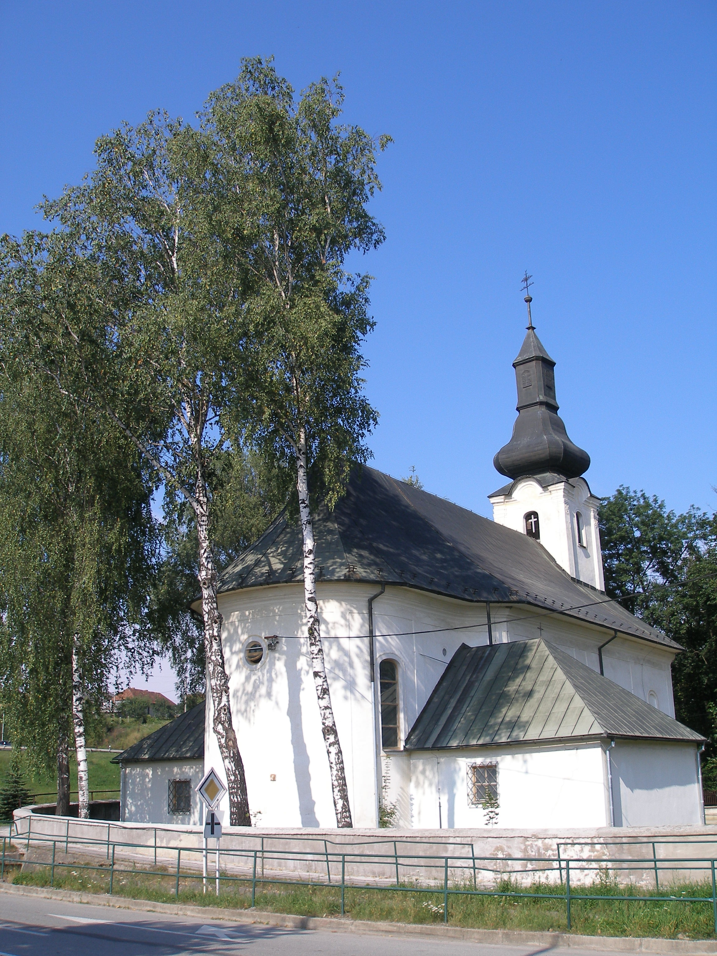 Obec Chminianska Nová Ves okr.Prešov, región Šariš This medium shows the protected monument with the number 707-300/0 in the Slovak Republic.